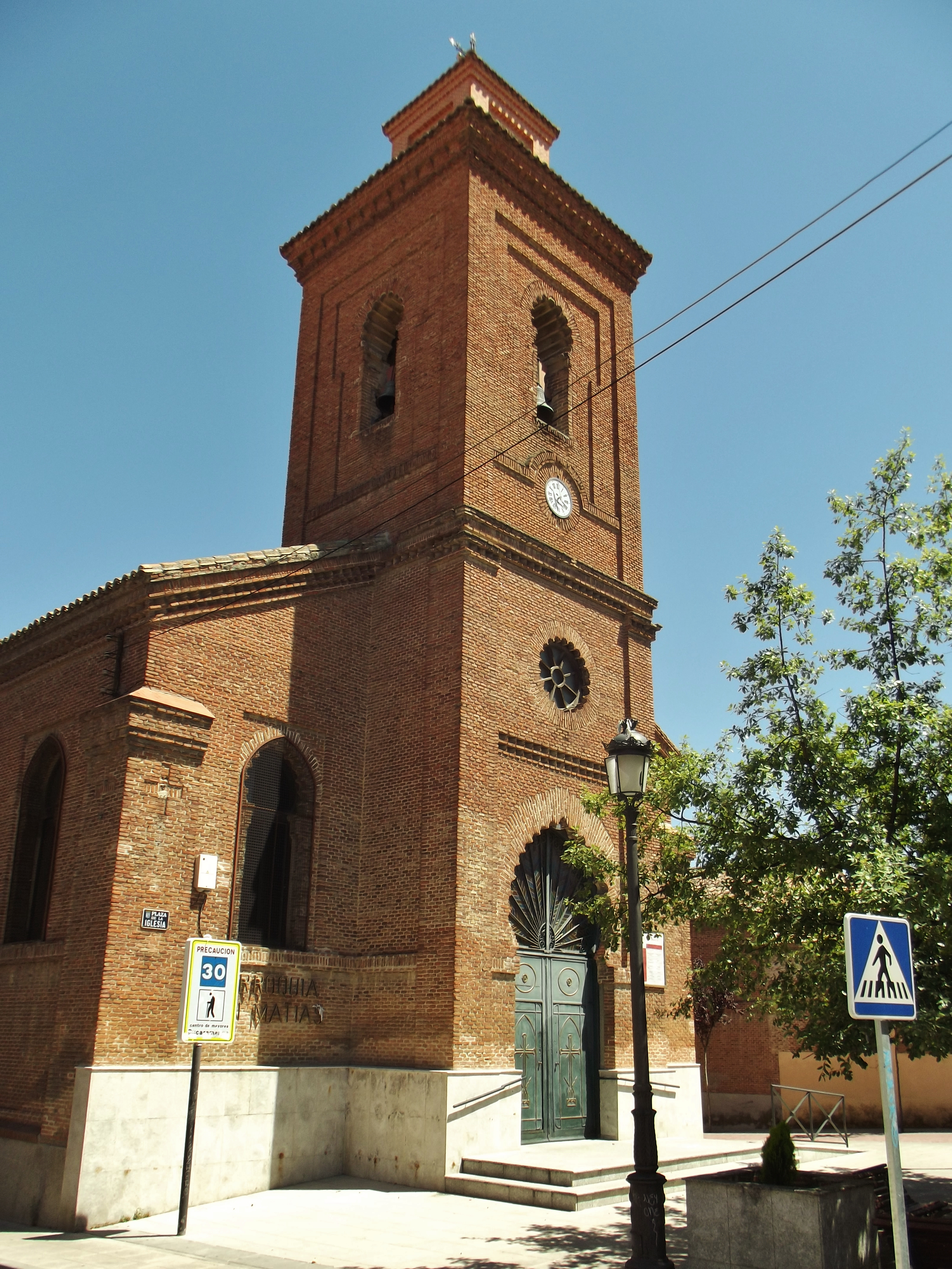 Iglesia parroquial de San Matías, Madrid.